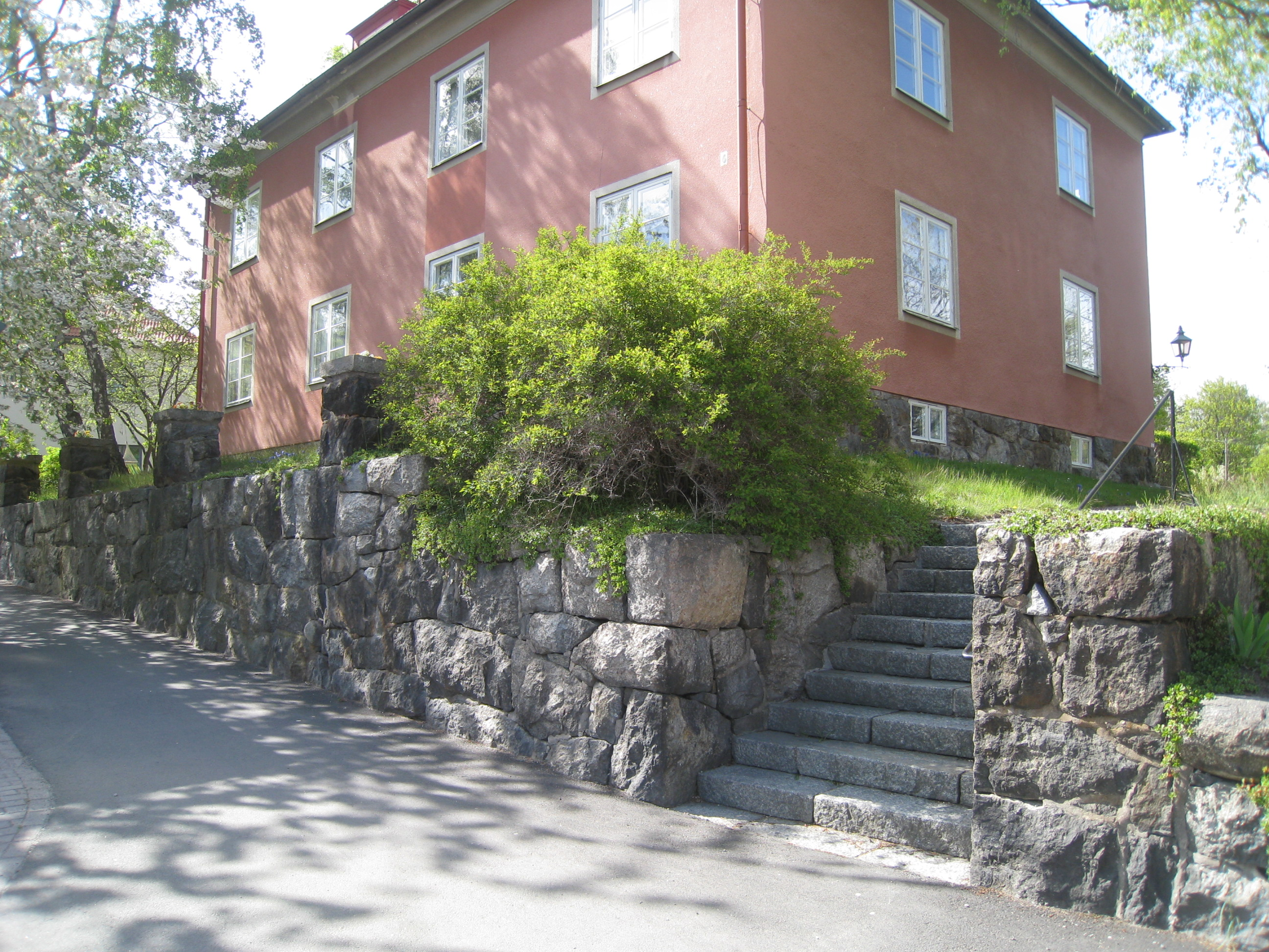 Västerled 6, Alléparken, Äppelviken, Bromma. Kvarter: Ärilen 7, Äppelviken. Flerfamiljshus om två våningar och inredd vind, uppfört 1924. Byggnaden ligger högt belägen på en terrasserad tomt vid Västerled. Anläggningen omgärdas av granitmur med kraftiga stolpar, trappa leder upp till bostadshusets entré med placering mot baksidan. Huset har bevarat mycket av sin ursprungliga karaktär, symmetriskt uppbyggd fasad, valmat sadeltak med utsvängt nedre fall och tvåkupigt taktegel. Gården är delvis grusad, planterad med prydnadsbuskar och gräsmatta. Källa: Bebyggelseregistret.